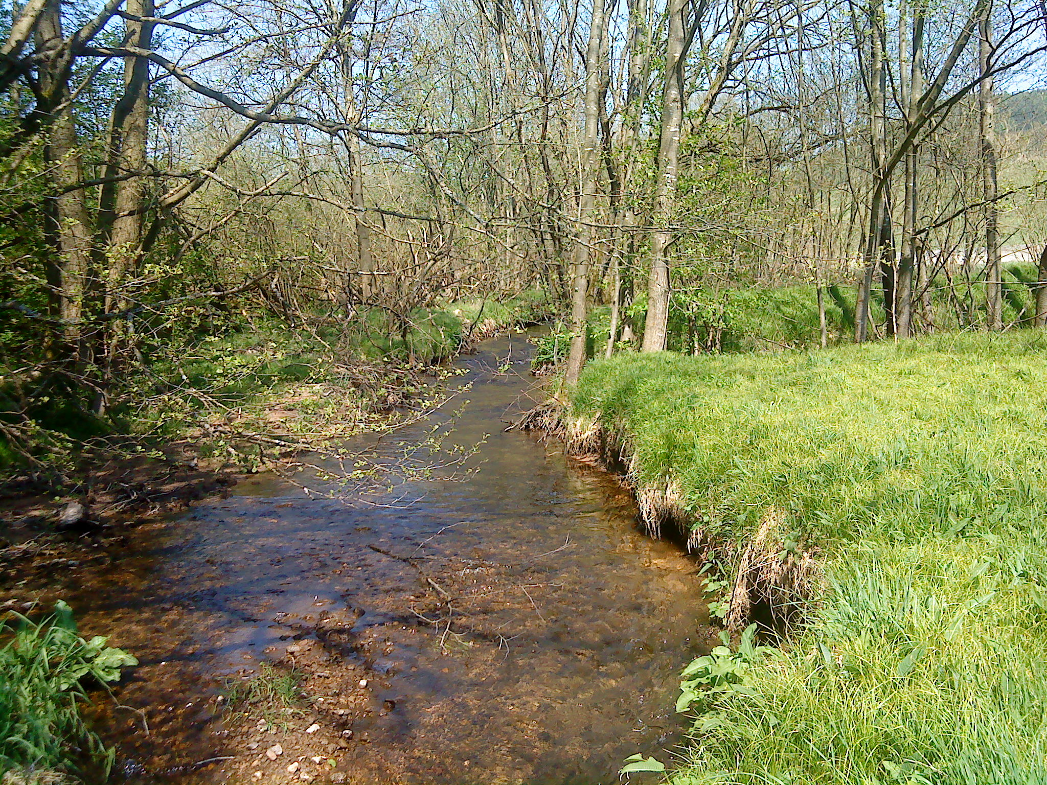 Der Lohrbach nach Lohrhaupten